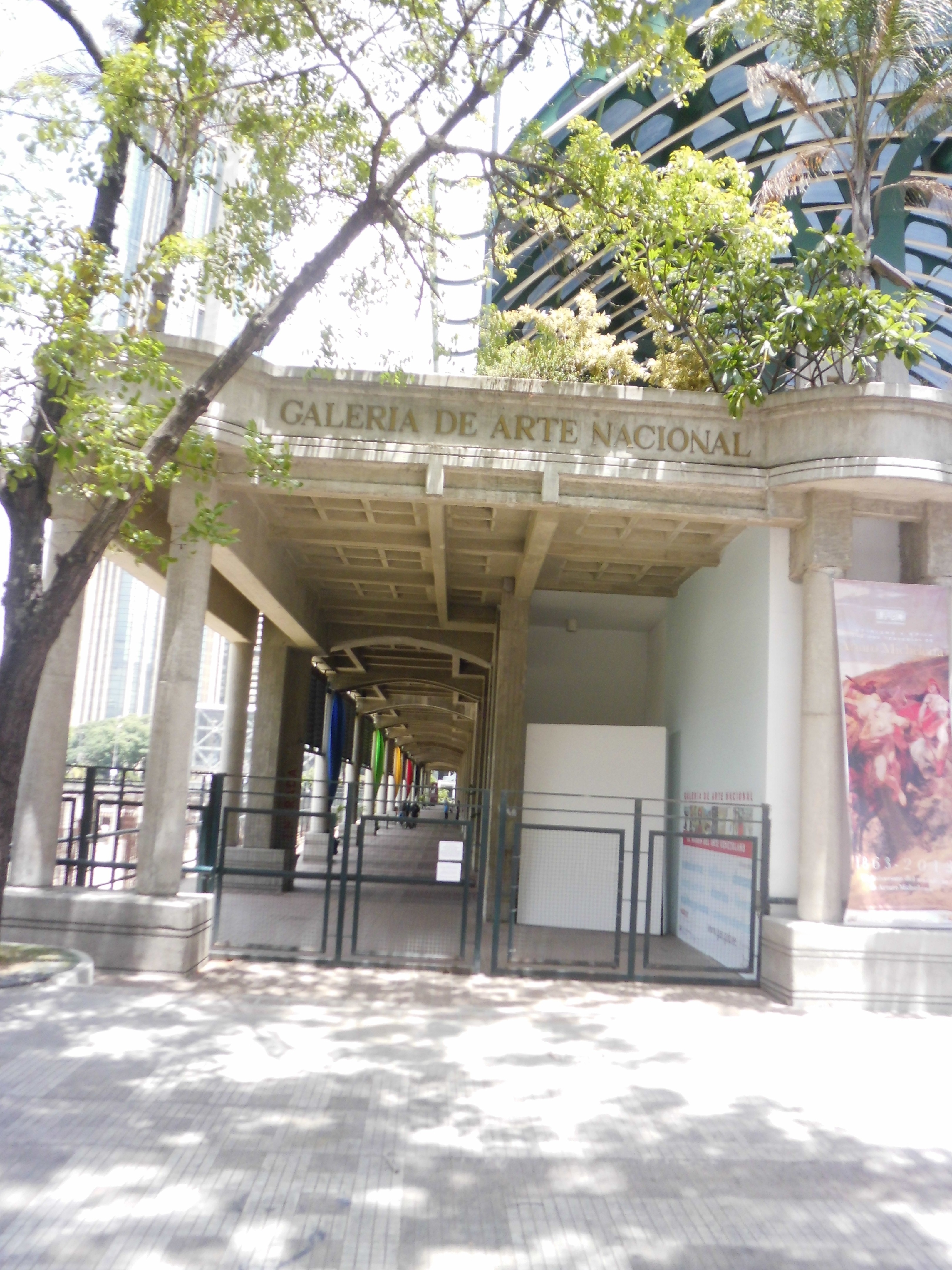 Galería de Arte Nacional, nueva sede desde abril del 2009, Caracas, Distrito Capital - Venezuela.